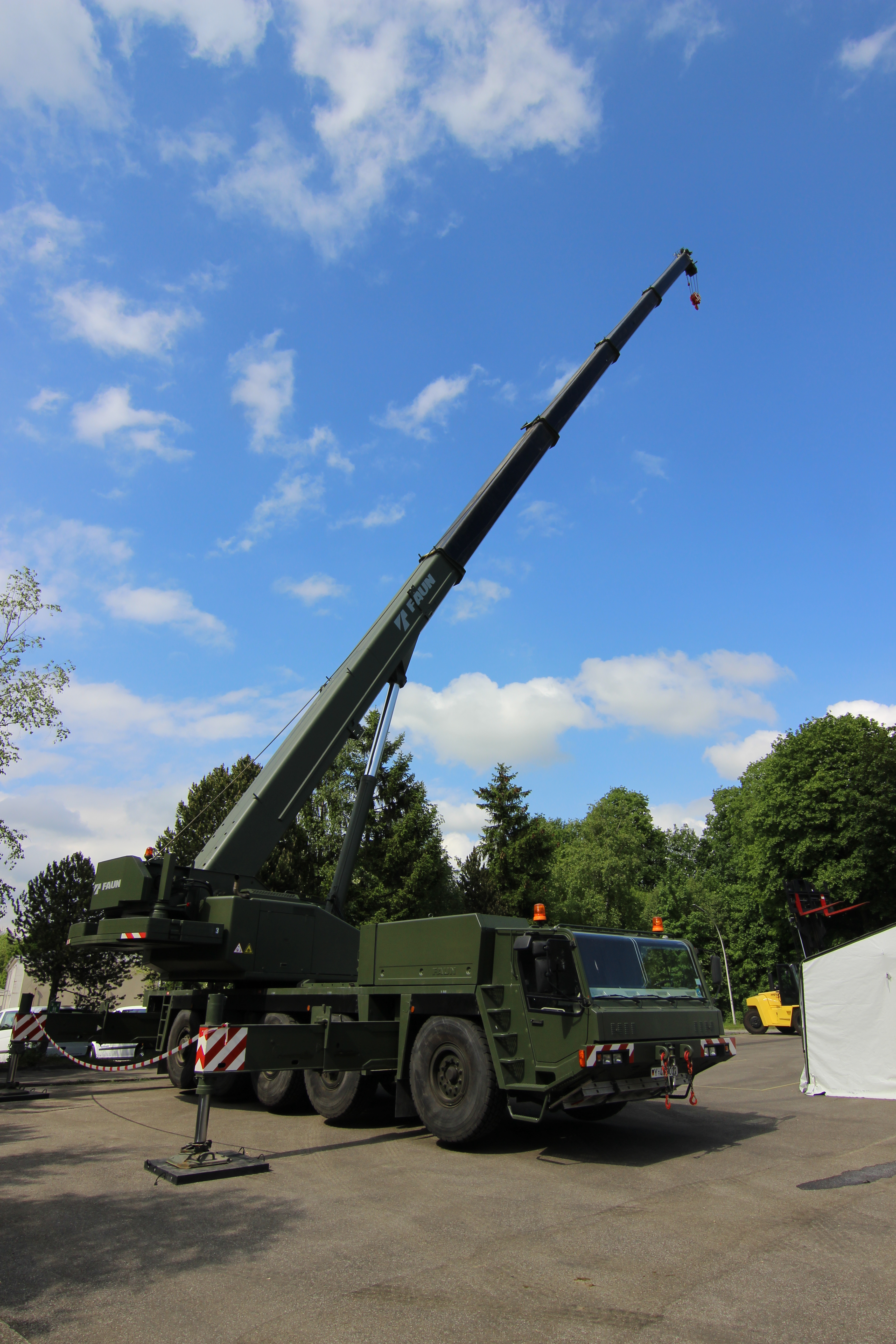 Artillerie-Kaserne Kempten: Tag der offenen Tür am 24. Mai 2014